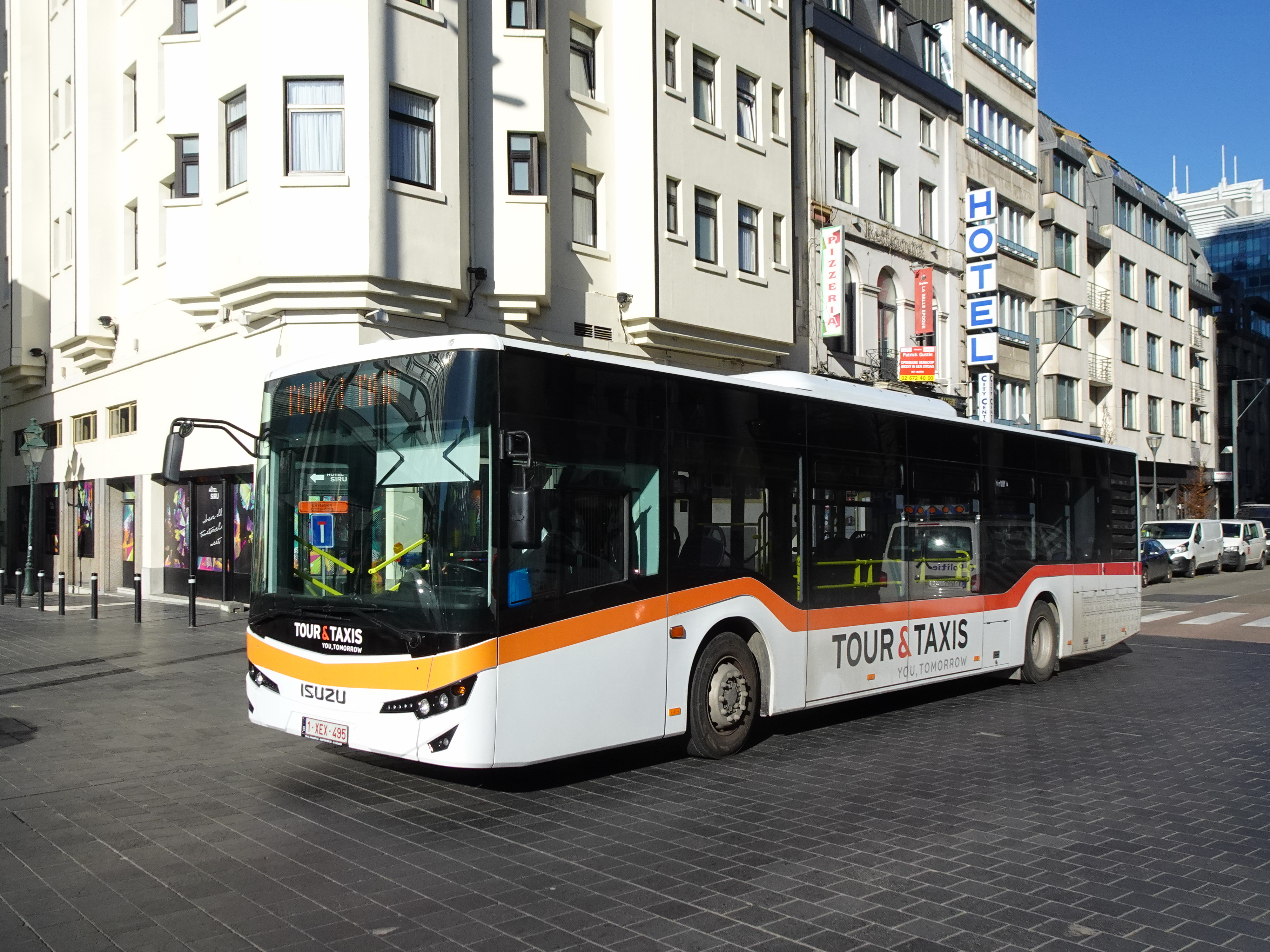 Autobus navette pour Tour & Taxis, place Rogier. Il s'agit d'un Isuzu Citiport flambant neuf ; modèle fort rare en Belgique.